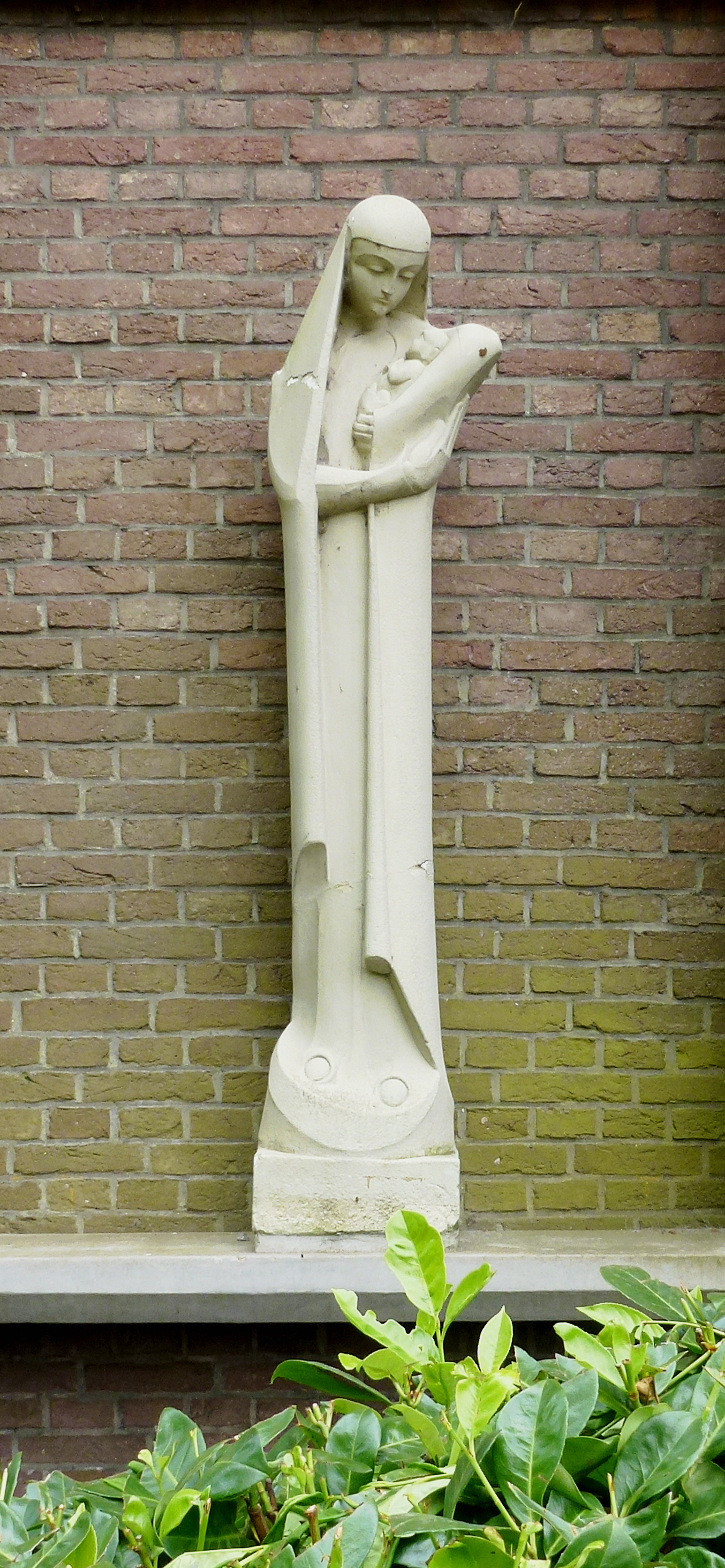 Sint-Victorkerk, Waddinxveen. Sculptuur uit 1929, Maria met kind van Stef of Steph Uiterwaal. Een van de twee beelden voor de kerk. Ze stonden eerst in een nis aan de gevel van de Josephschool, later Kameleon, aan de Kanaalstraat in Waddinxveen.